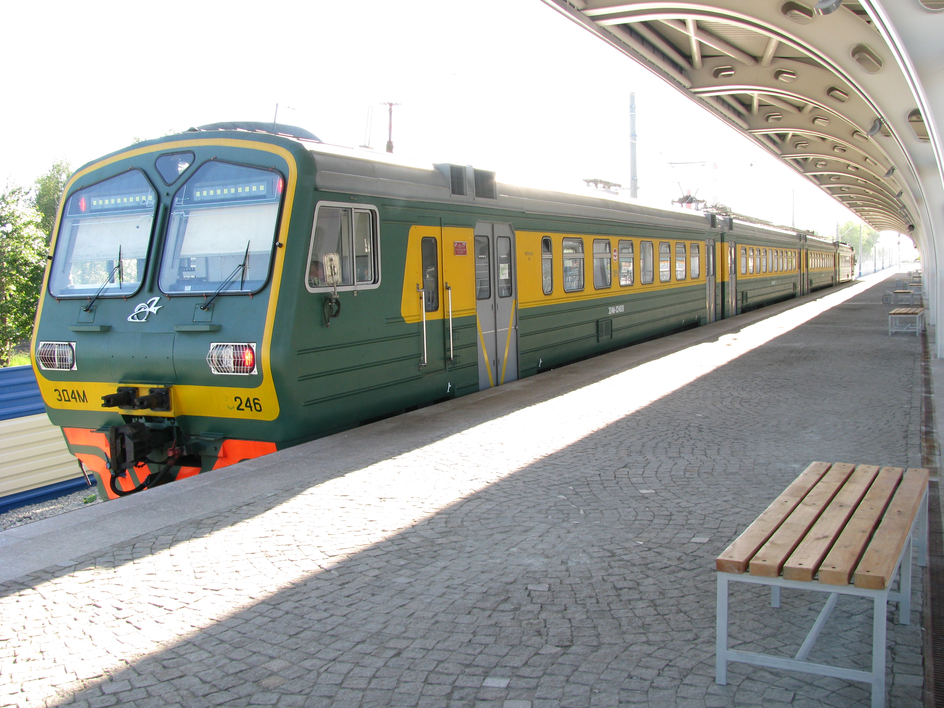 городская электричка в Екатеринбурге (Ж.Д.Вокзал - аэропорт Кольцово)